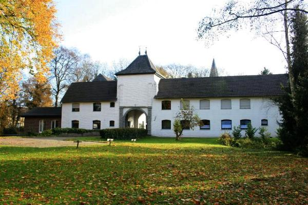 Haus Beeck in Wegberg-Beeck